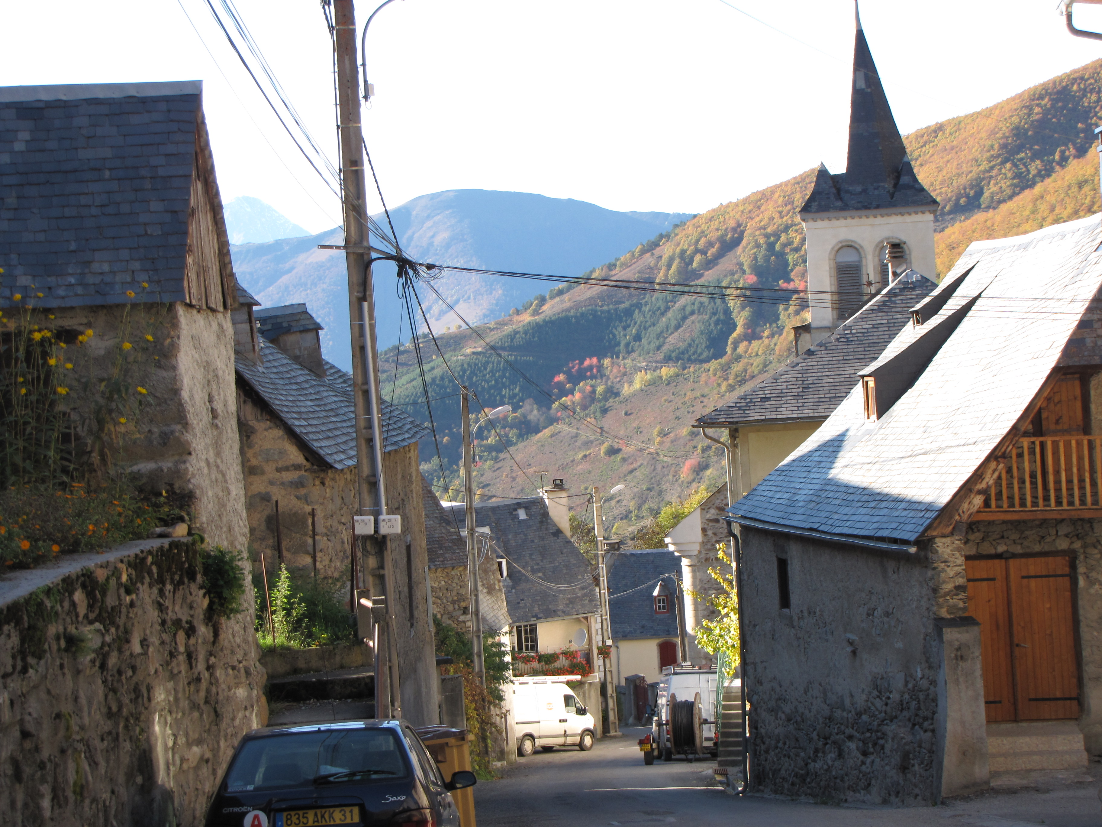 Bareilles